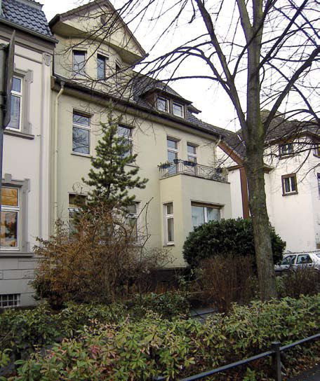 Haus Schützenstr. 7 (Bergheim)